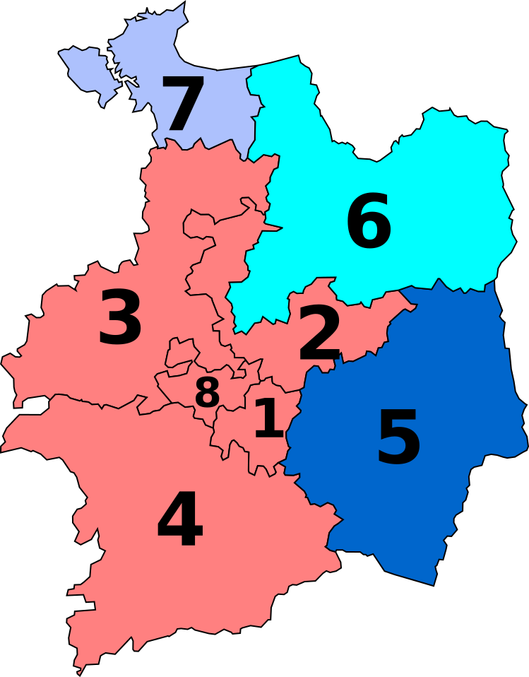 Résultats des élections législatives de l'Ille-et-Vilaine en 2012